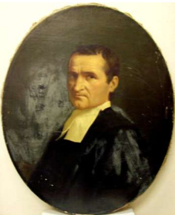 Portrait du naturaliste Frère Ogérien (en 1867) par le peintre Alexandre Grellet, alors Frère Athanase en religion.